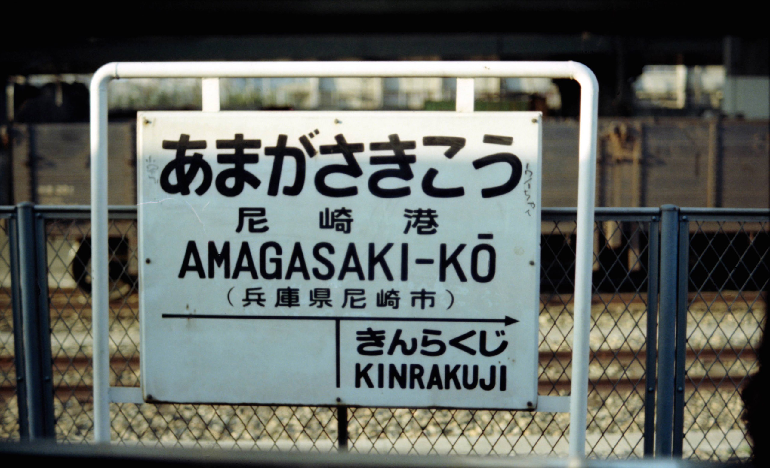 JNR Fukuchiyama-Line Amagasaki-kou sta name Board